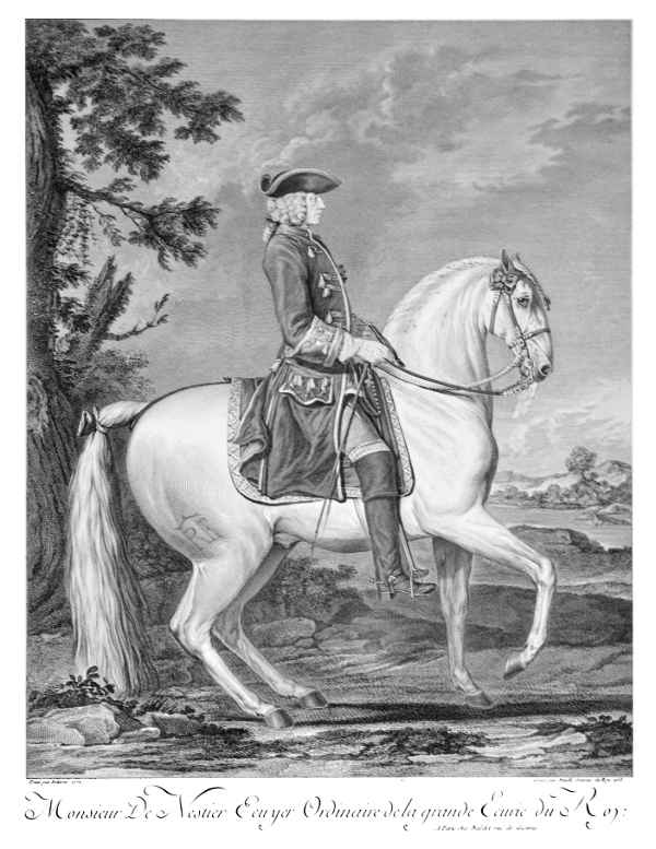 Monsieur de Nestier Écuyer Ordinaire de la Grande Écurie du Roy.